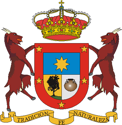 Escudo de Artenara